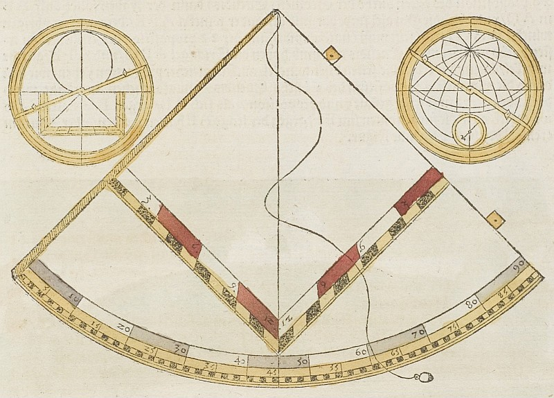 Original image description from the Deutsche Fotothek Geometrie & Vermessung & Quadrant & Messrahmen